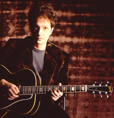 Sergio Caputo, 1998 Giulyfree ha ottenuto l'autorizzazione alla riproduzione su Wikipedia, dal detentore dei diritti, delle fotografie presenti nel sito ufficiale di Sergio Caputo in PD (Pubblico Dominio)